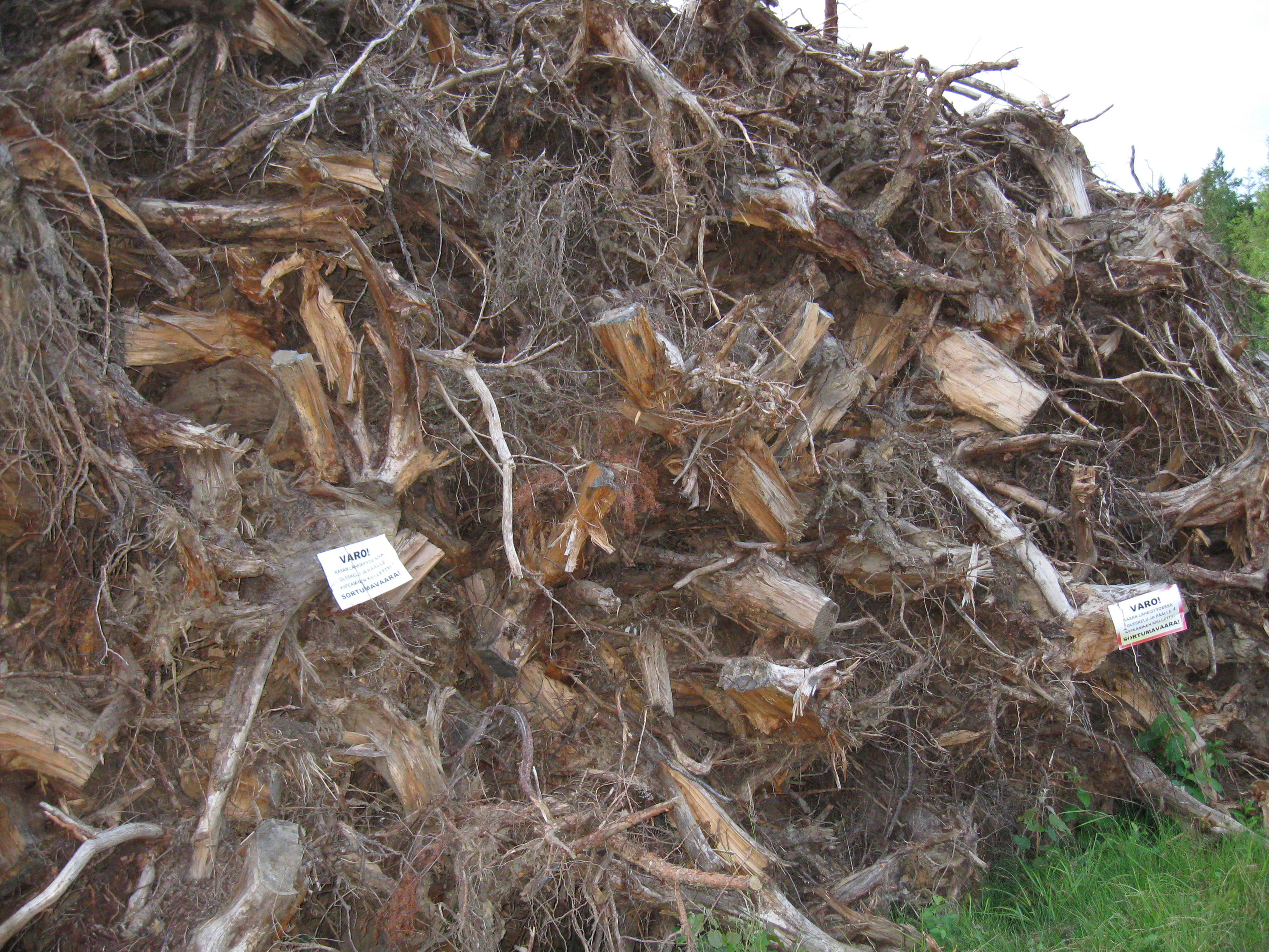 Kasa murskattuja kantoja odottamassa vientiä käytettäväksi.